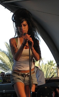 Amy Winehouse